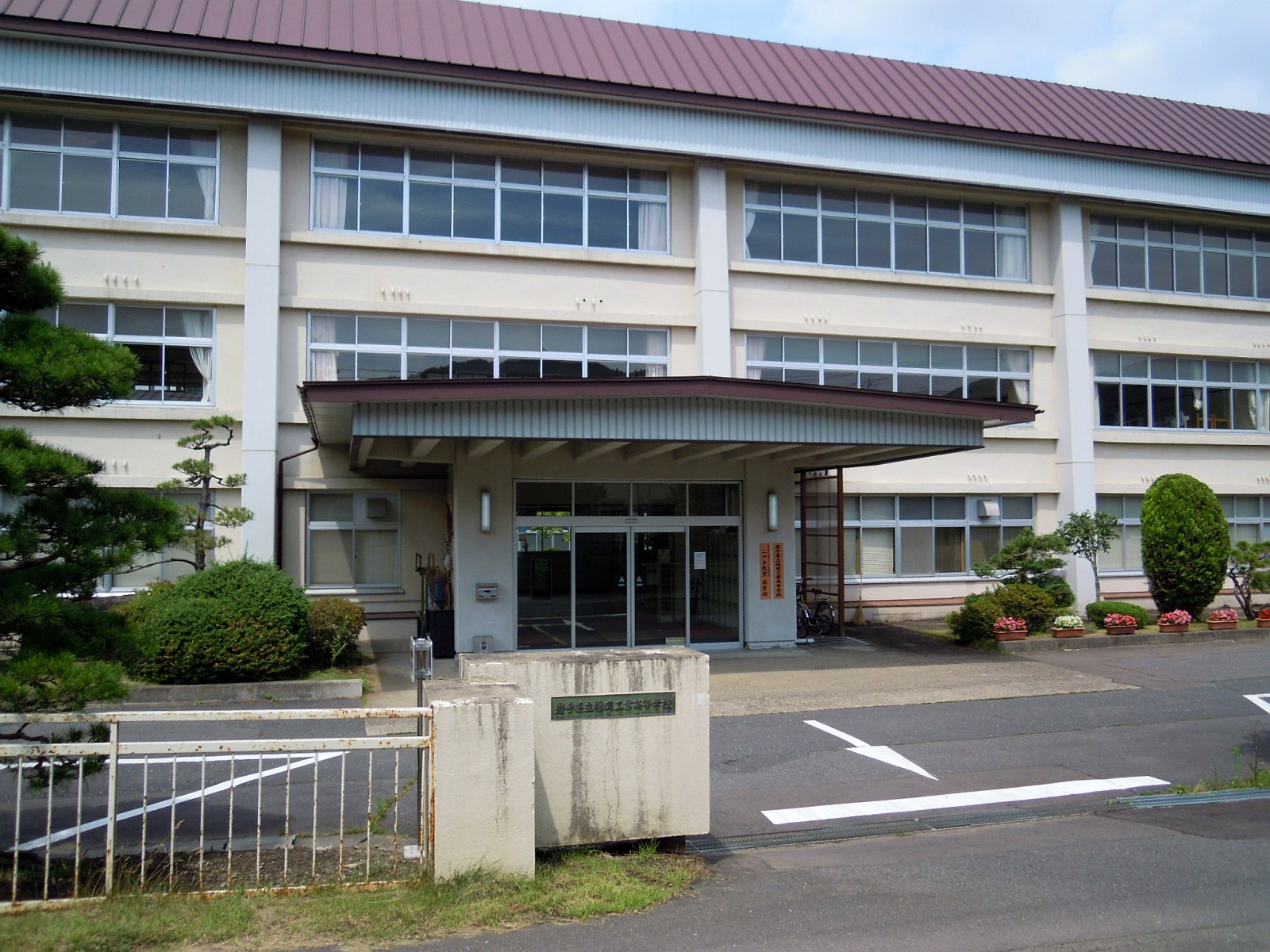 岩手県二戸市にある岩手県立福岡工業高校の校門